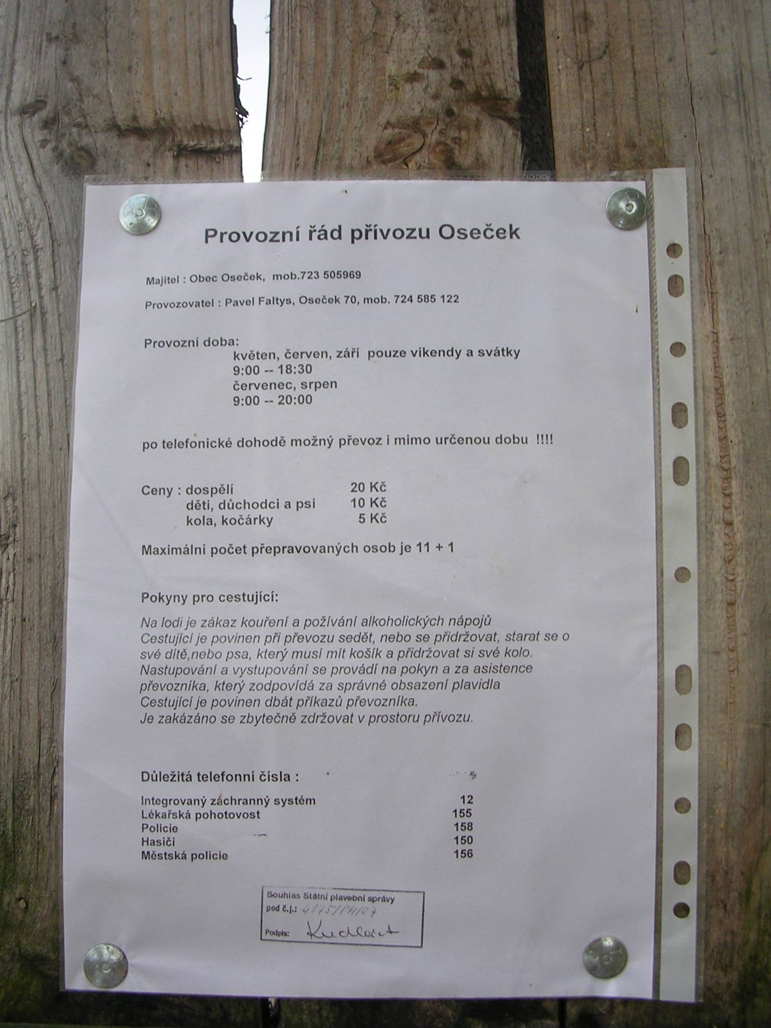 Přívoz Oseček (u Poděbrad). Informační leták s ceníkem, západní břeh.